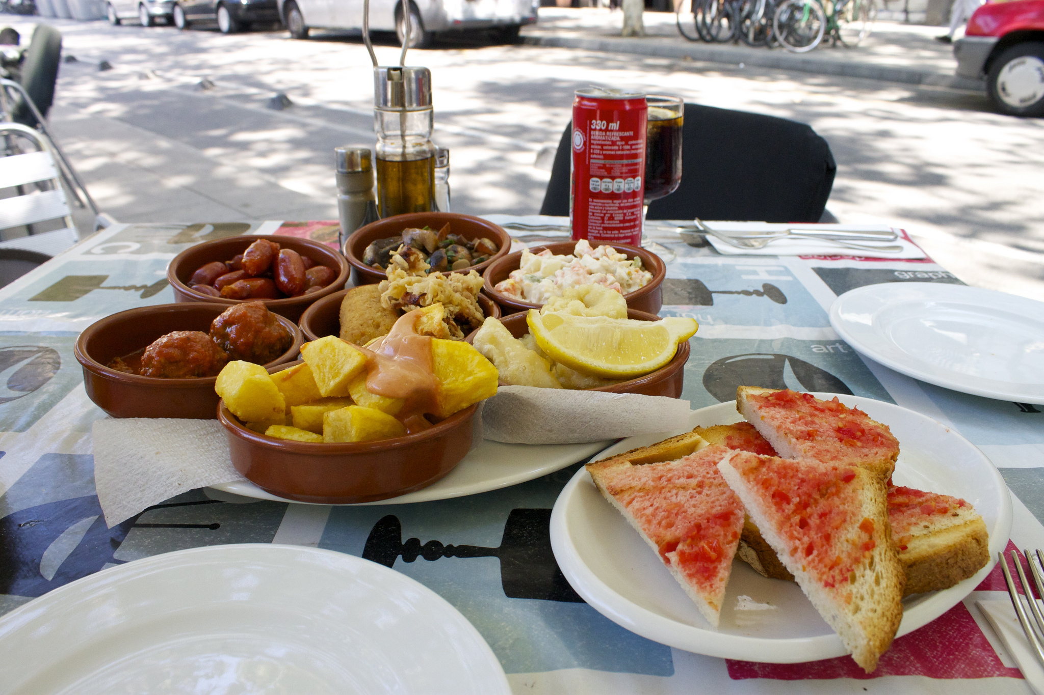 Tapas servidas en el barrio de El Raval, en Barcelona. Entre otras, pueden verse algunas tapas típicas como pa amb tomàquet, patatas bravas, ensaladilla rusa o choricitos